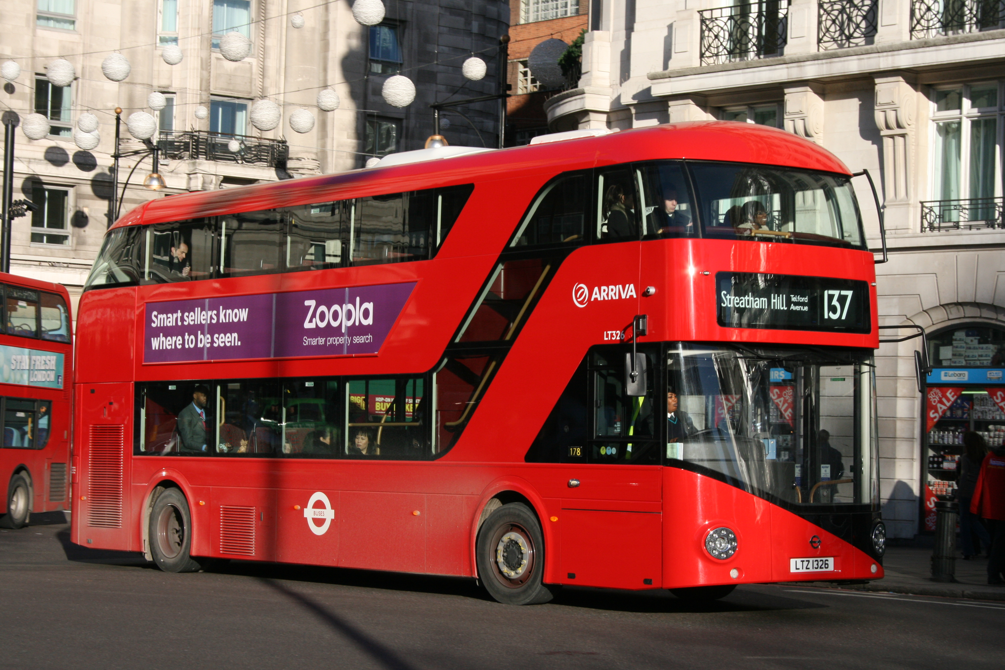 LTZ1326